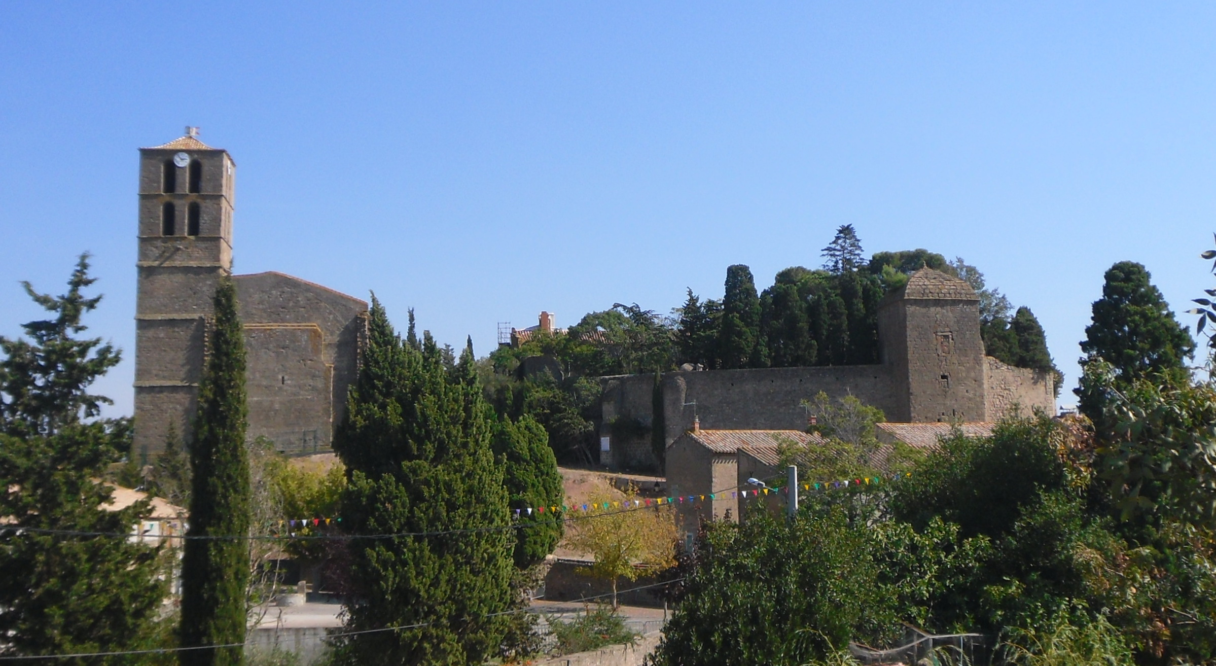 Église et château à Puichéric